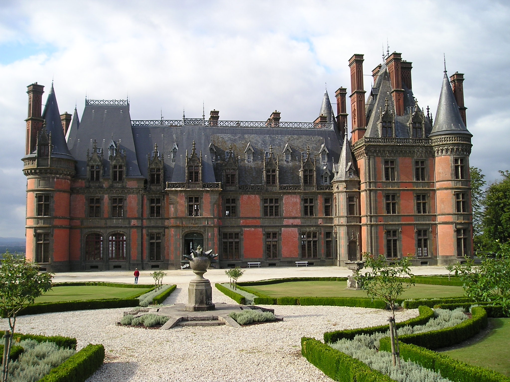 Façade Sud Trévarez